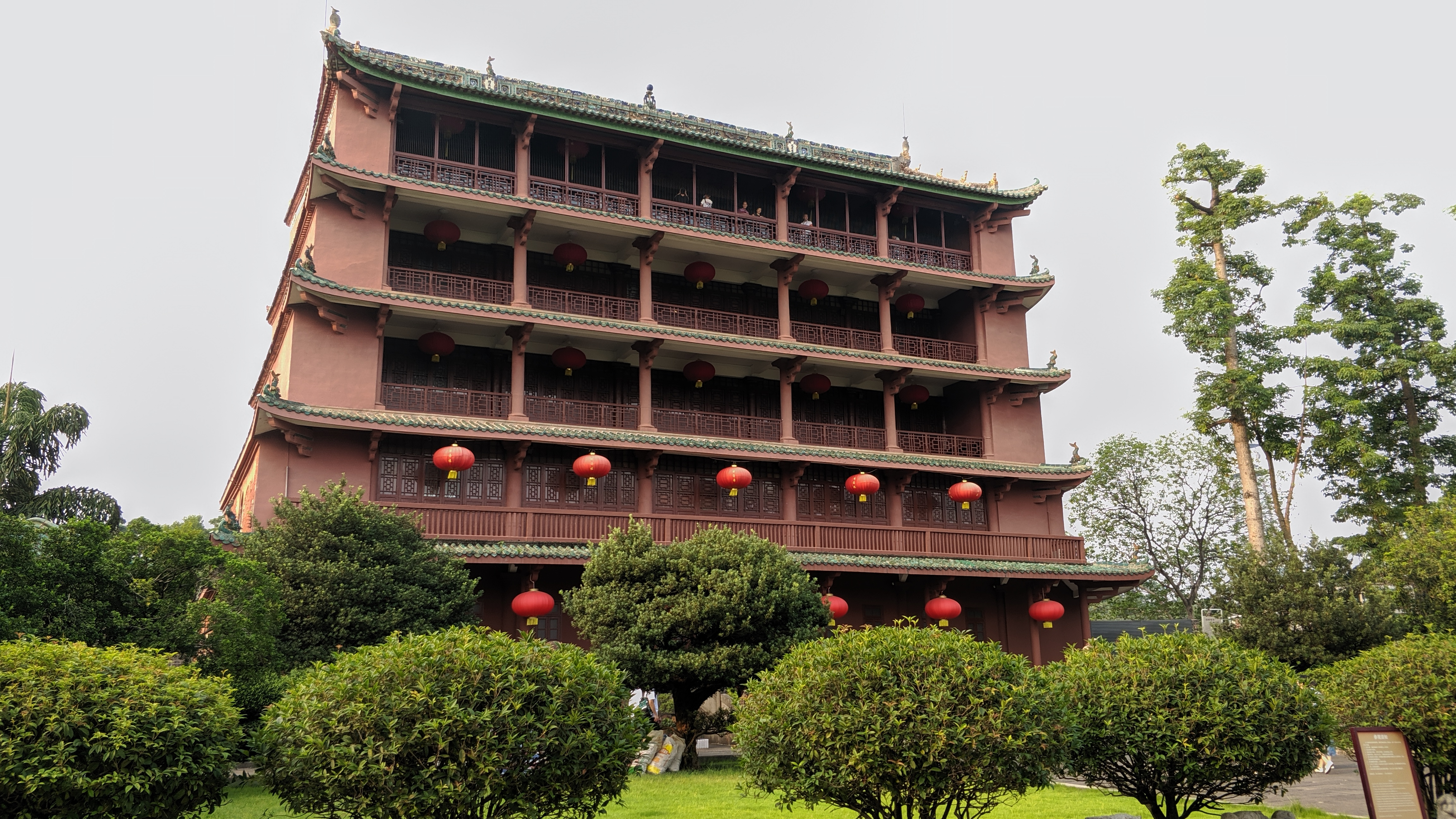 广州市越秀区的望海楼，现为广州市博物馆，国家一级博物馆之一